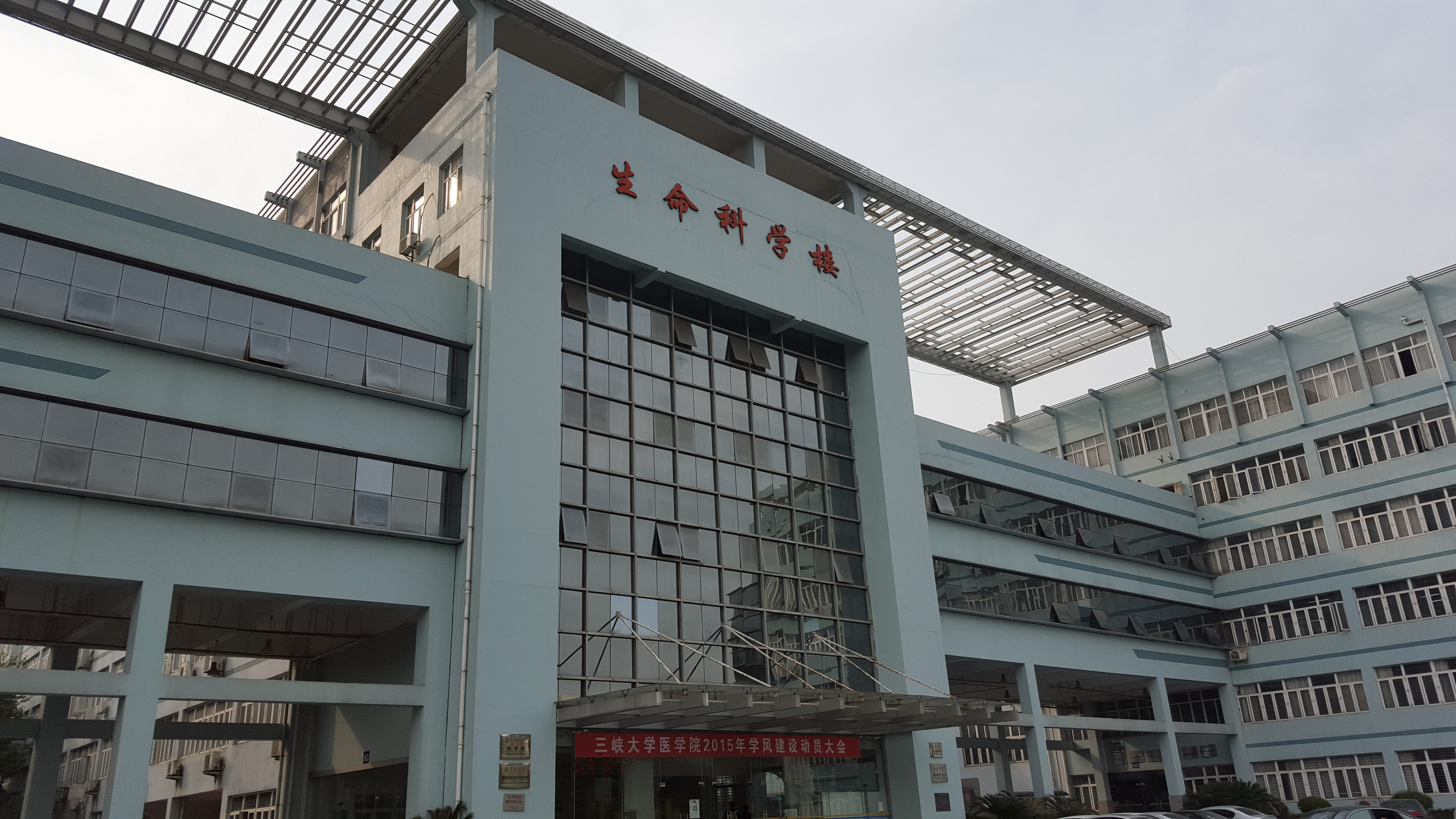 三峡大学生命科学楼